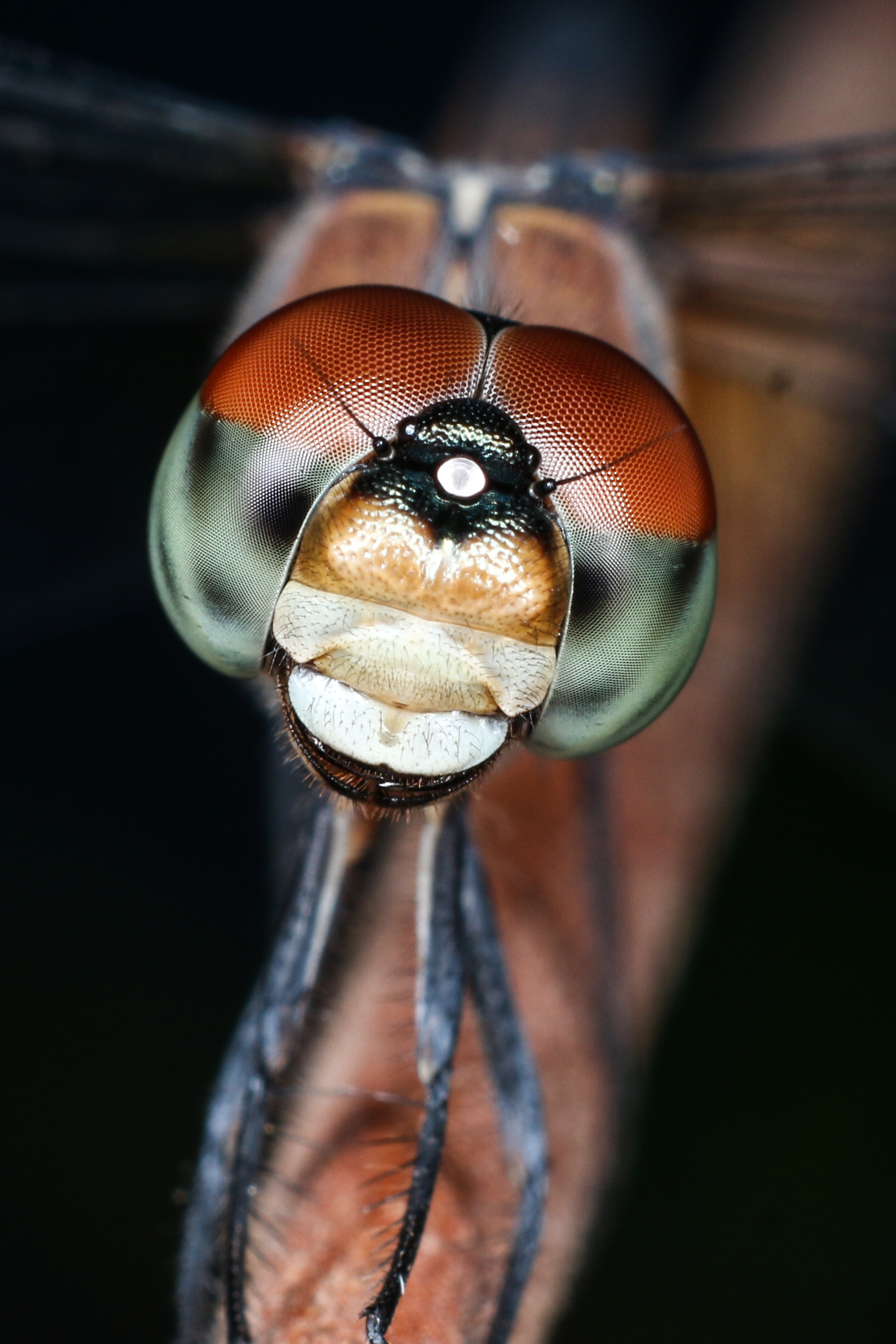 30.000 segi mata majemuk capung memberikan informasi yang berbeda-beda tentang sekelilingnya